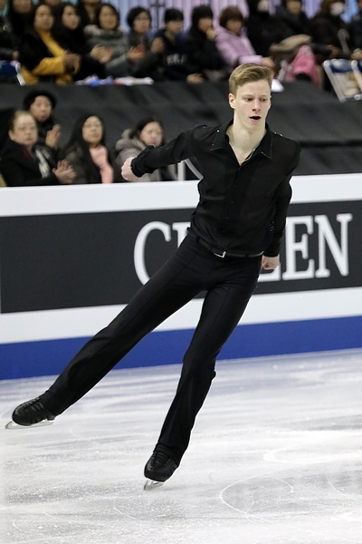 Алексей Ерохов (Россия) на финале юниорского Гран-при 2017-2018